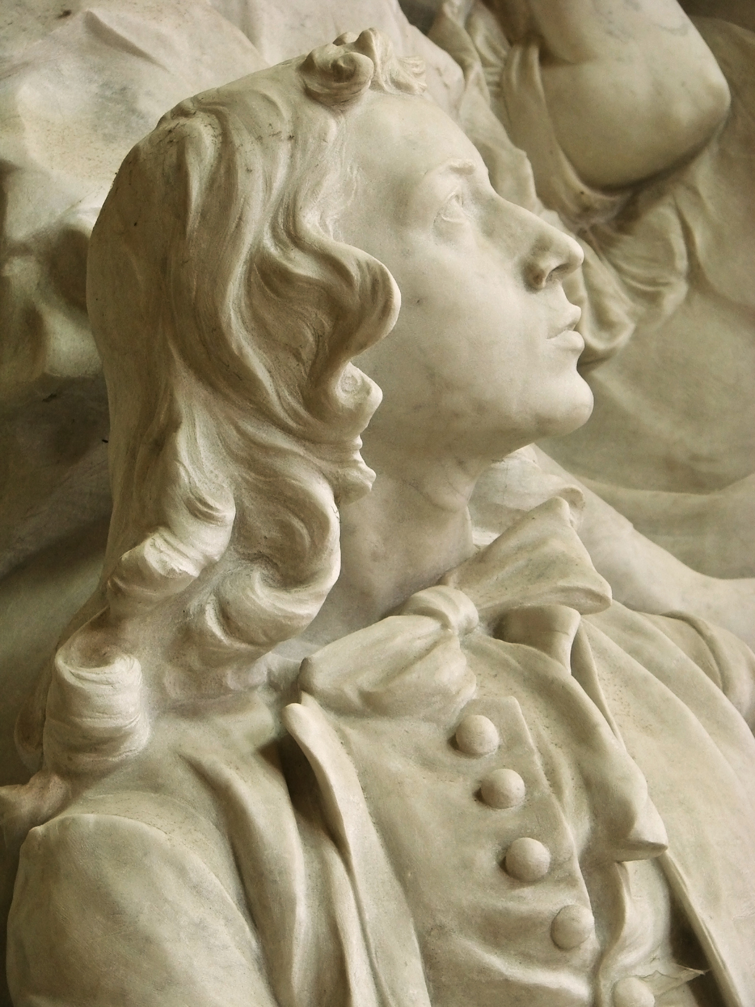 Le Grand Monument de Bossuet, oeuvre d'Ernest Henri Dubois (Dieppe 16/03/1863 - Paris 30/12/1930), placé dans la cathédrale de Meaux en 1911. Détail: le Grand Dauphin.